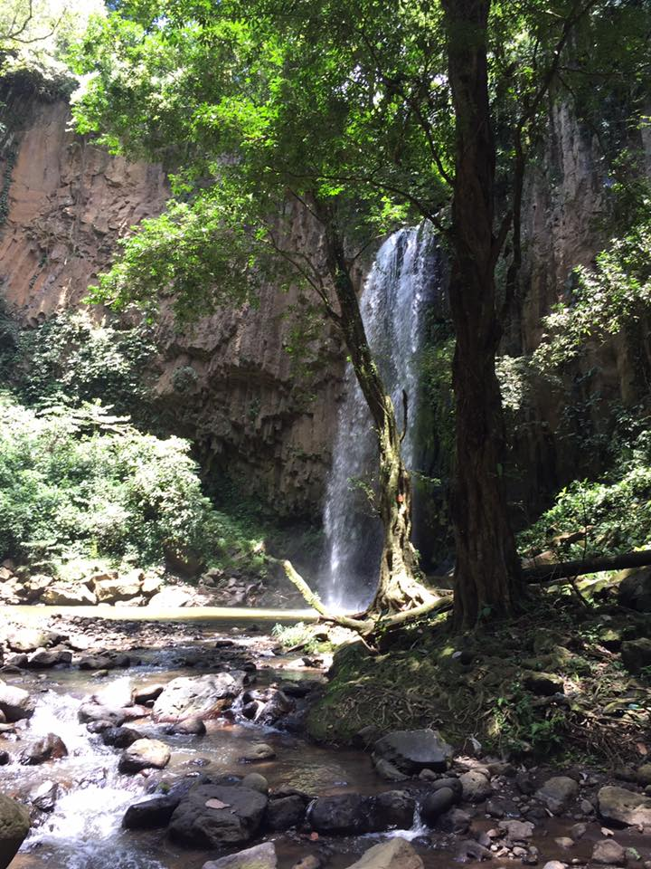 Río Cajón, entre el barrio Los Angeles y Barrio Fatima, ciudad de Atenas, Costa Rica